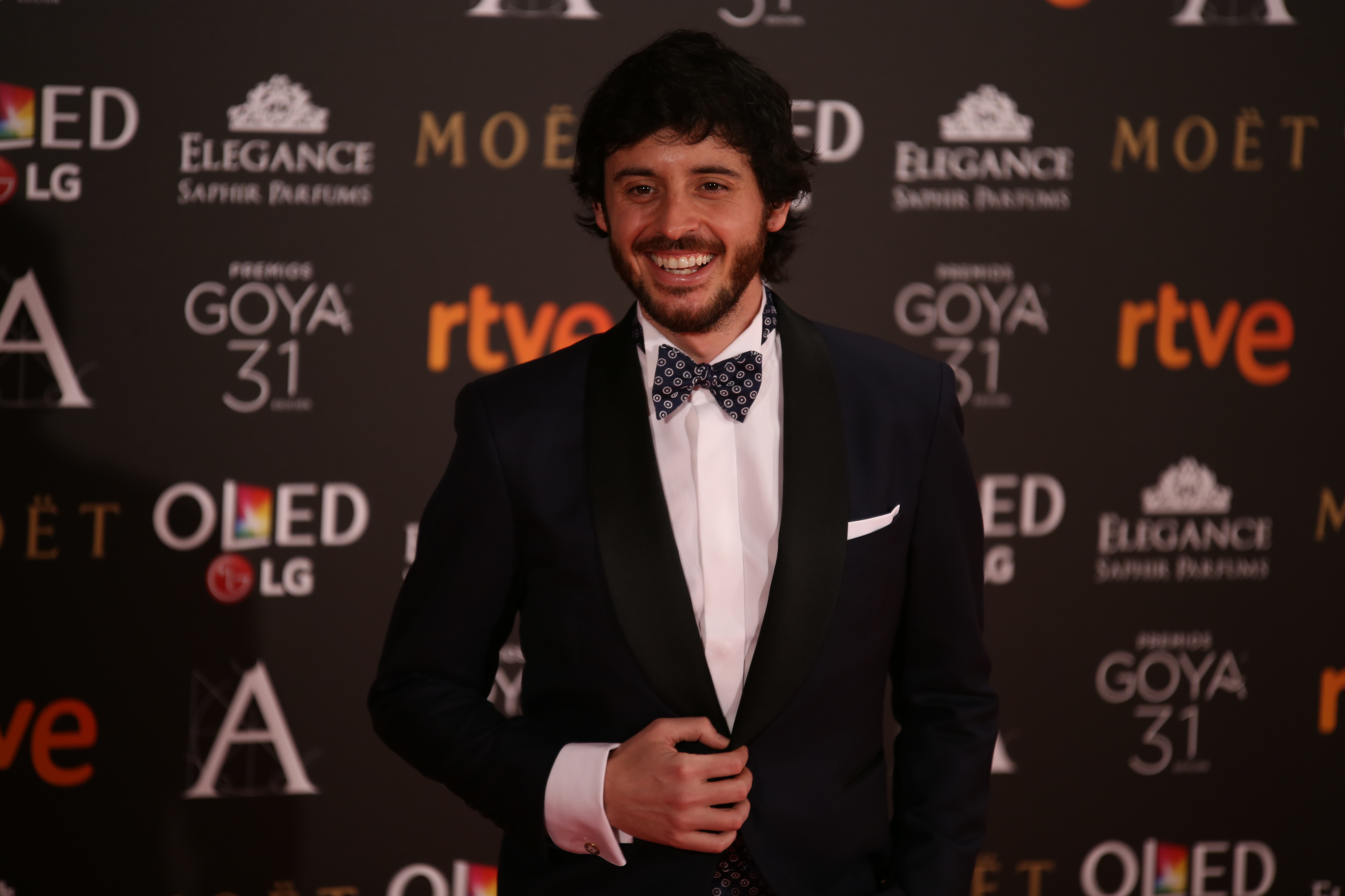 Premios Goya 2017